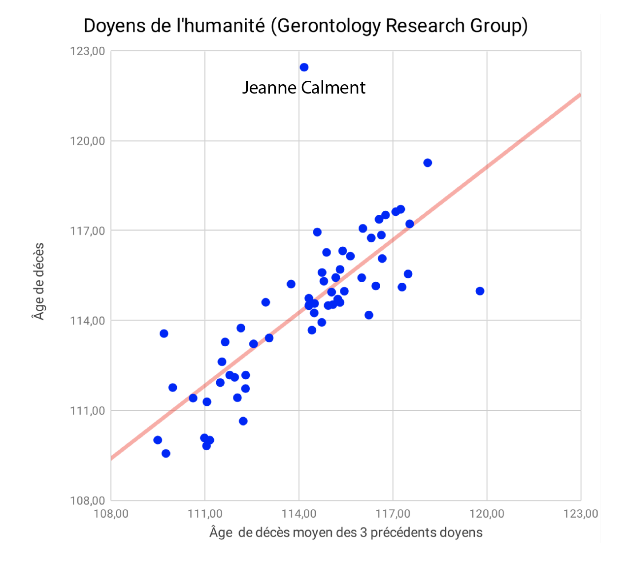 Sur la base des données du Gerontology Research Group qui maintient la liste des doyens de l'humanité, ce graphique permet de visualiser la répartitions des doyens selon leur âge de décès et l'âge moyen des doyens de leur époque.